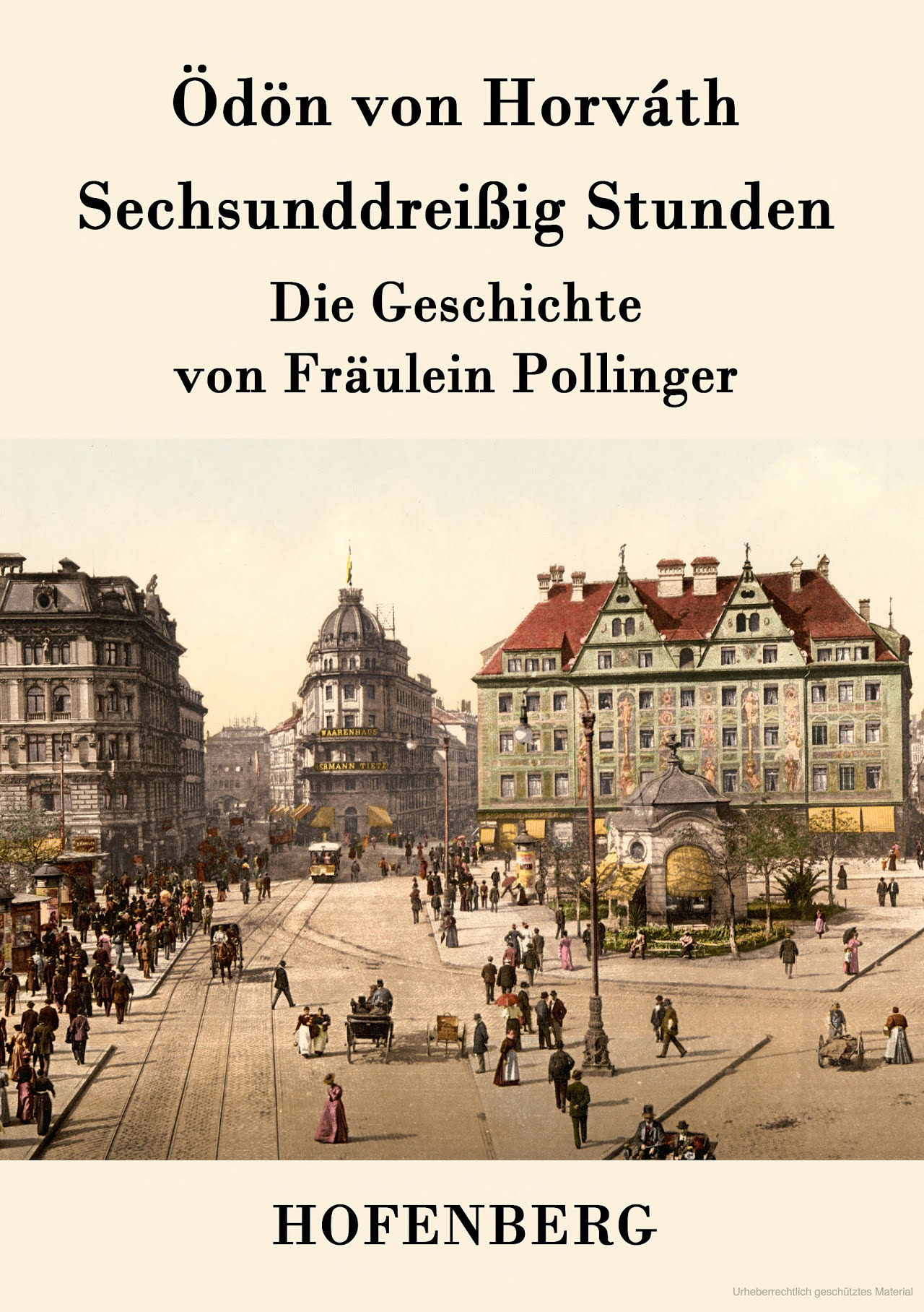 Cover des Romans Sechsunddreißig Stunden von Ödön von Horváth